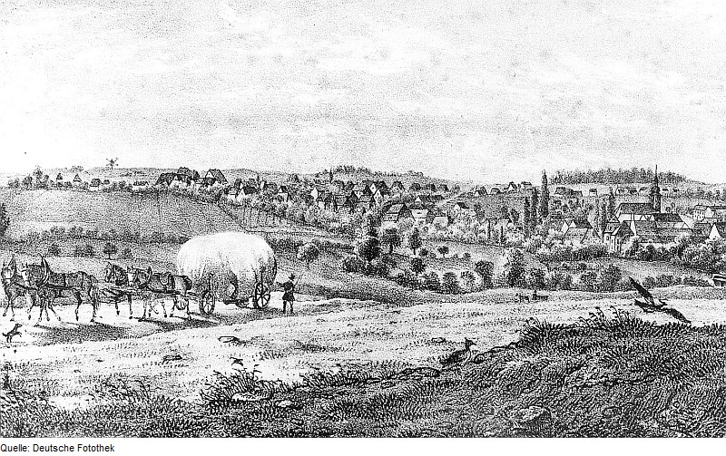 Original image description from the Deutsche Fotothek Wintersdorf. Ortsansicht